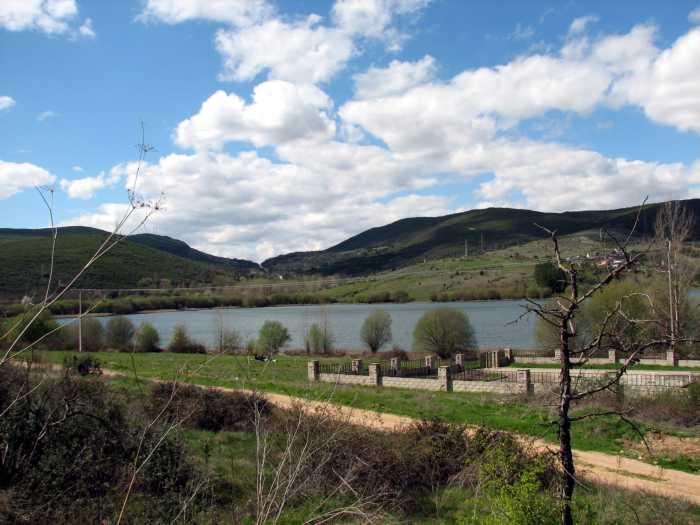 Imagen del Lago de Carucedo